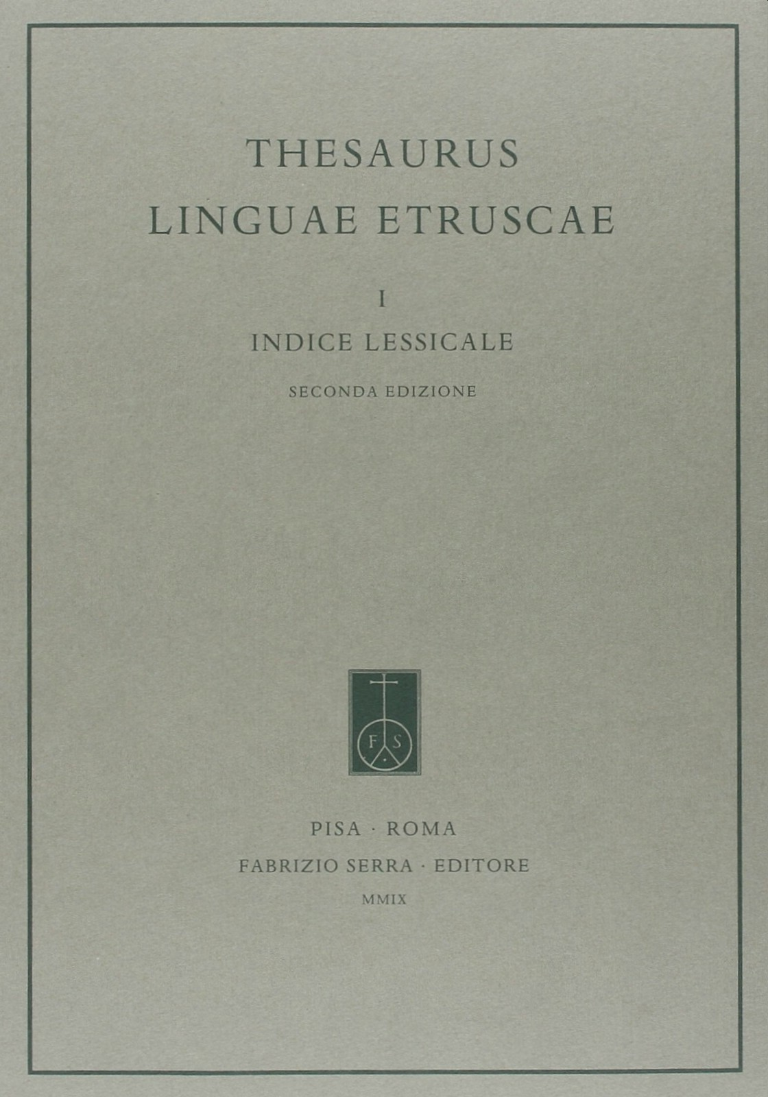 Enrico Benelli: Thesaurus Linguae Etruscae. I. Indice lessicale. Seconda edizione completamente riveduta sulla base della prima edizione pubblicata nel 1978 da Massimo Pallottino. Fabrizio Serra Editore, Pisa/Roma 2009.